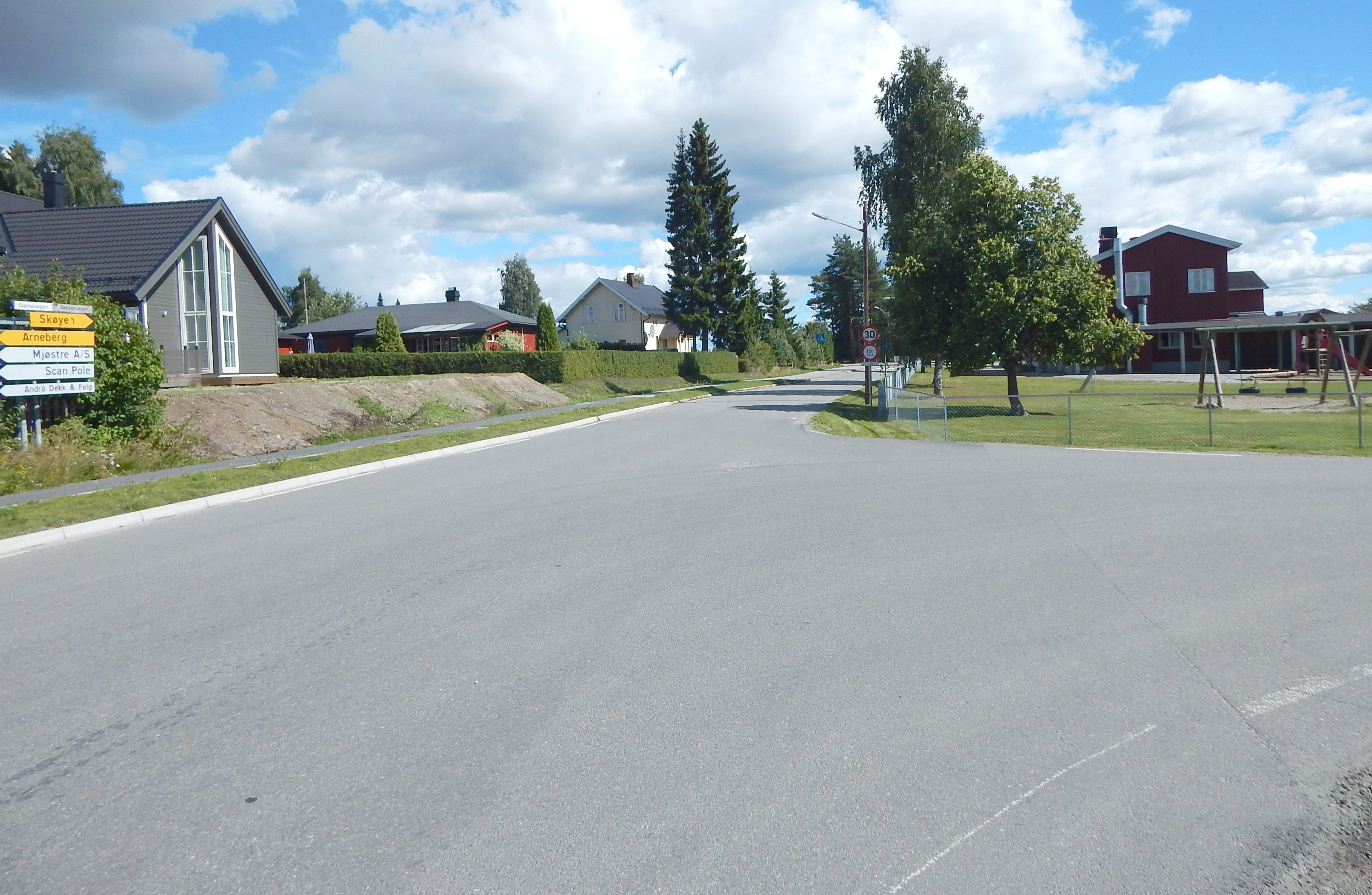 I dette krysset ved Breidablikk skole på Ilseng møtes Gamlevegen (fylkesvei 1910, tidl 236, t.v.), Løkenvegen (fylkesvei 1912, tidl. 237, t.h.) og Skøyenvegen (innover i bildet).